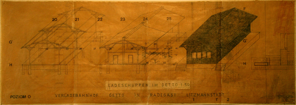 Stacja Radegast Łódź